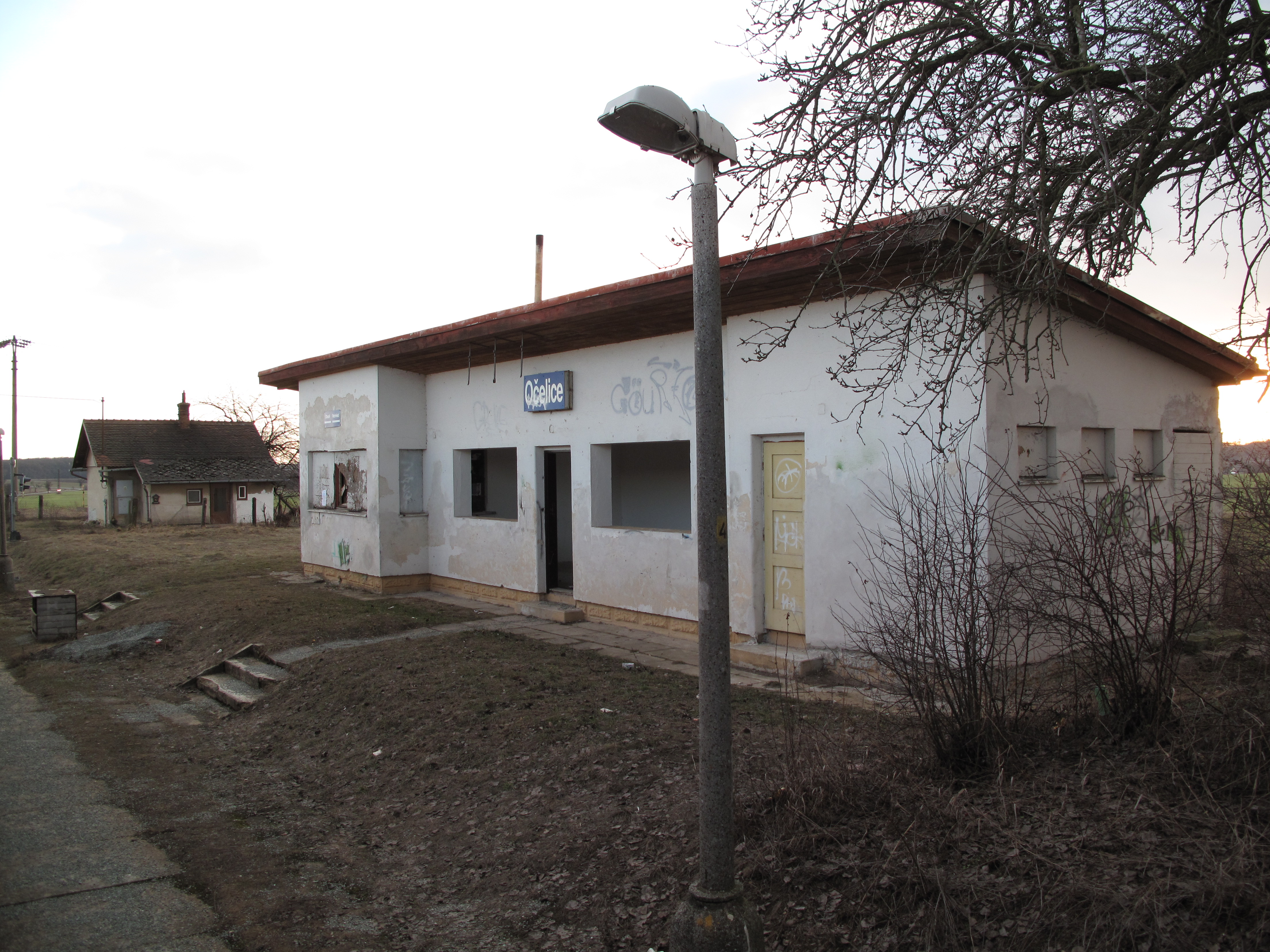 Očelice, železniční stanice